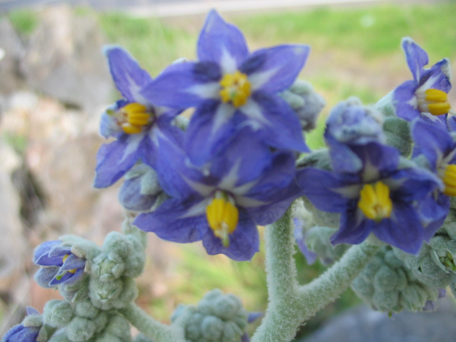 Wollblütiger nachtschatten (Solanum mauritianum) - Blüte